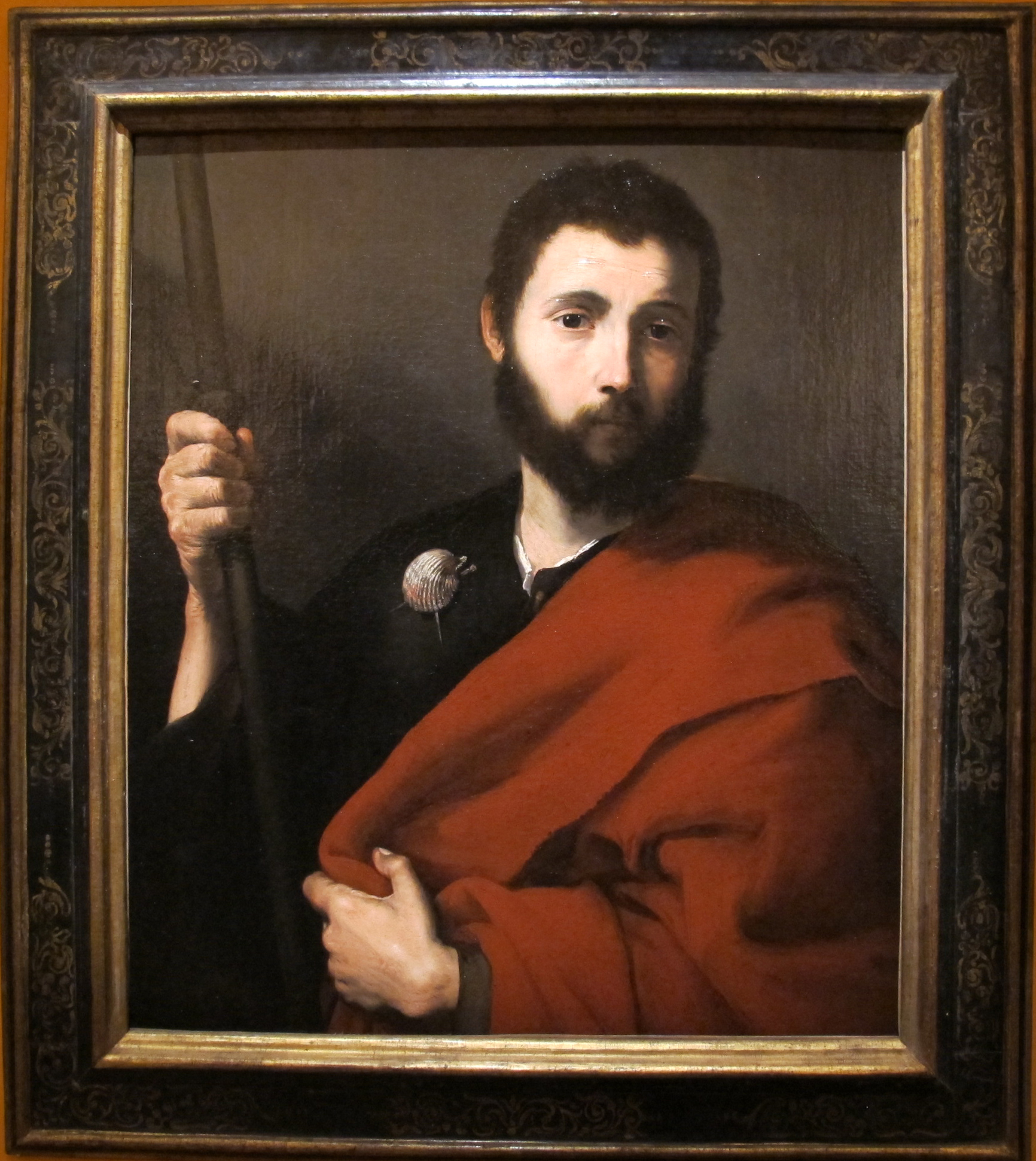 Jusepe de ribera, san giacomo maggiore, olio su tela, 74x64 cm, coll privata parigi